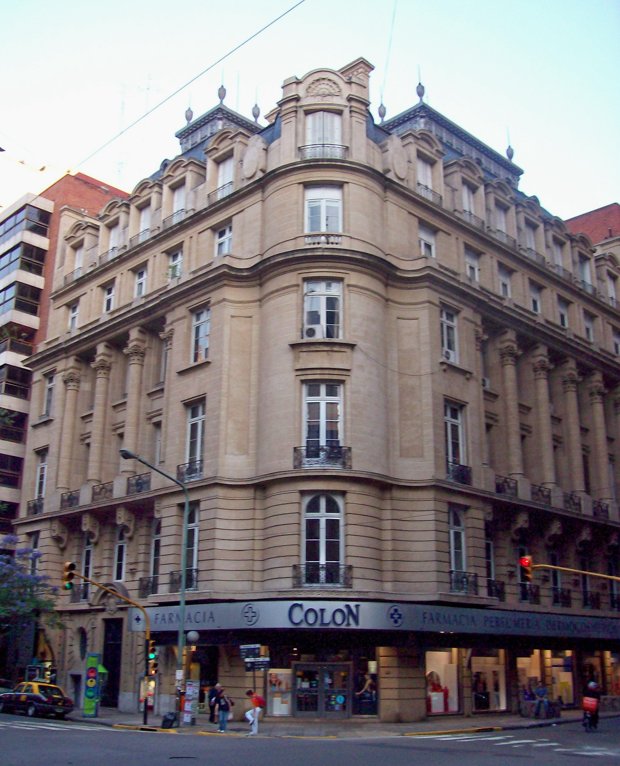 Avenida Callao en su cruce con Av. Las Heras(Ciudad de Buenos Aires). Se observa la esquina Este. (Foto tomada de Oeste a Este.